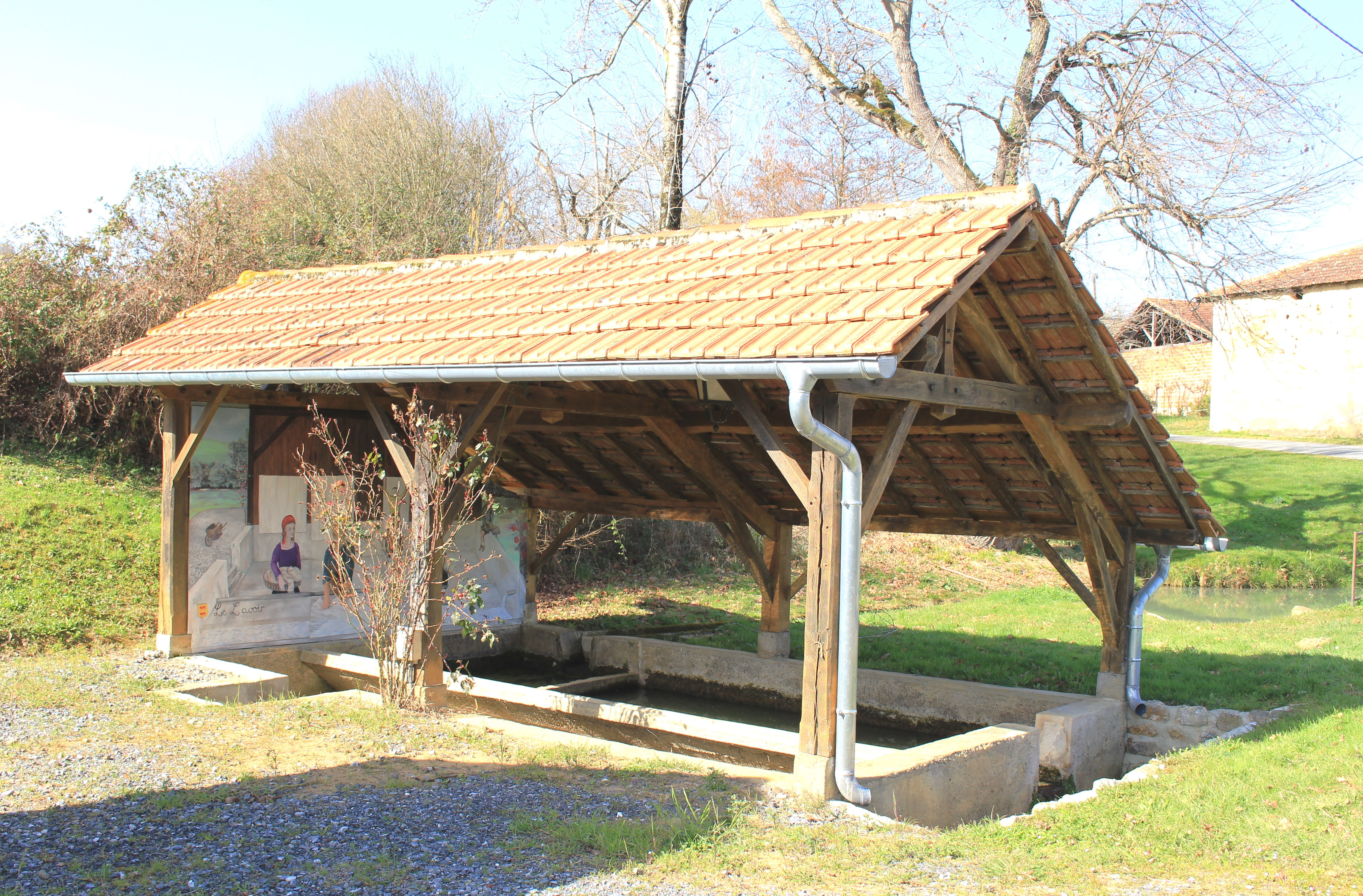 Lavoir de Mazerolles (Hautes-Pyrénées)